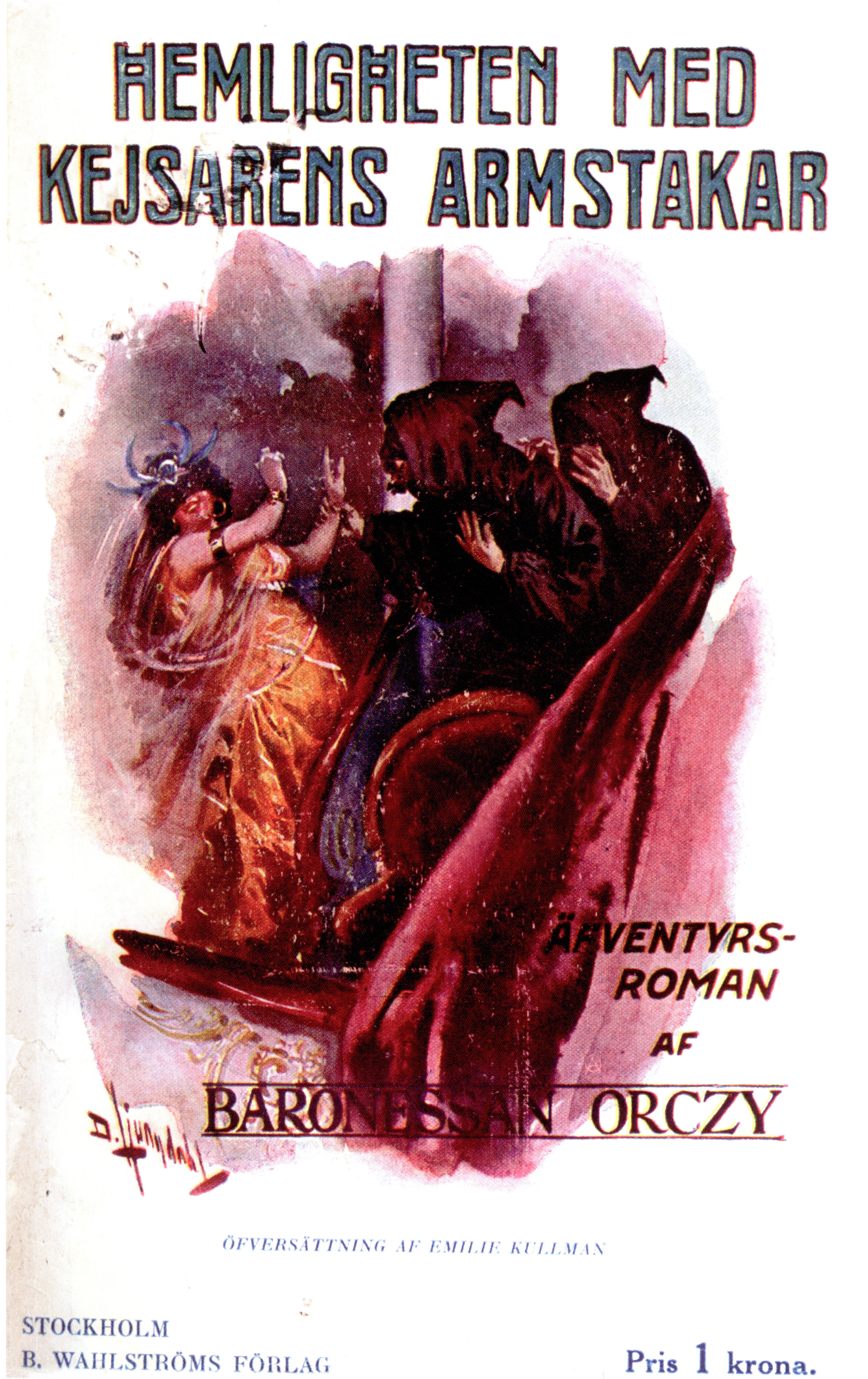 Book cover by David Ljungdahl (1870-1940): Hemligheten med kejsarens armstakar